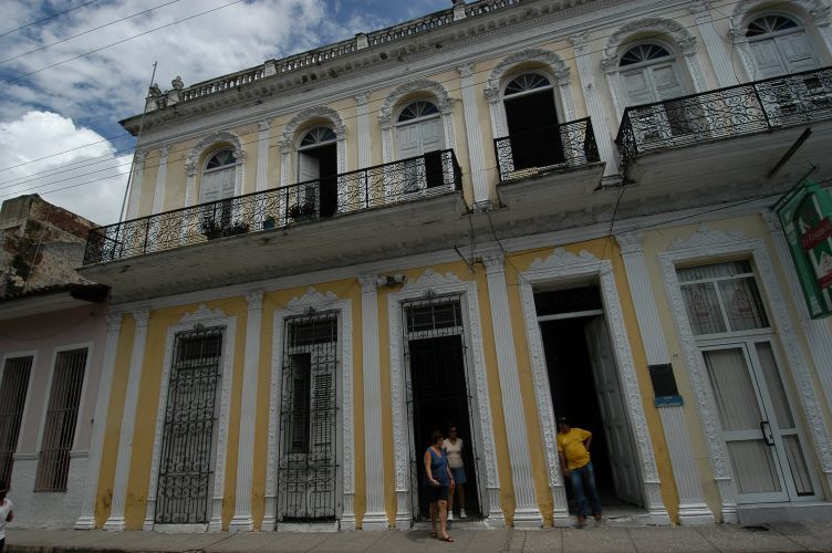 Cuba, september 2005, info in de Metadata